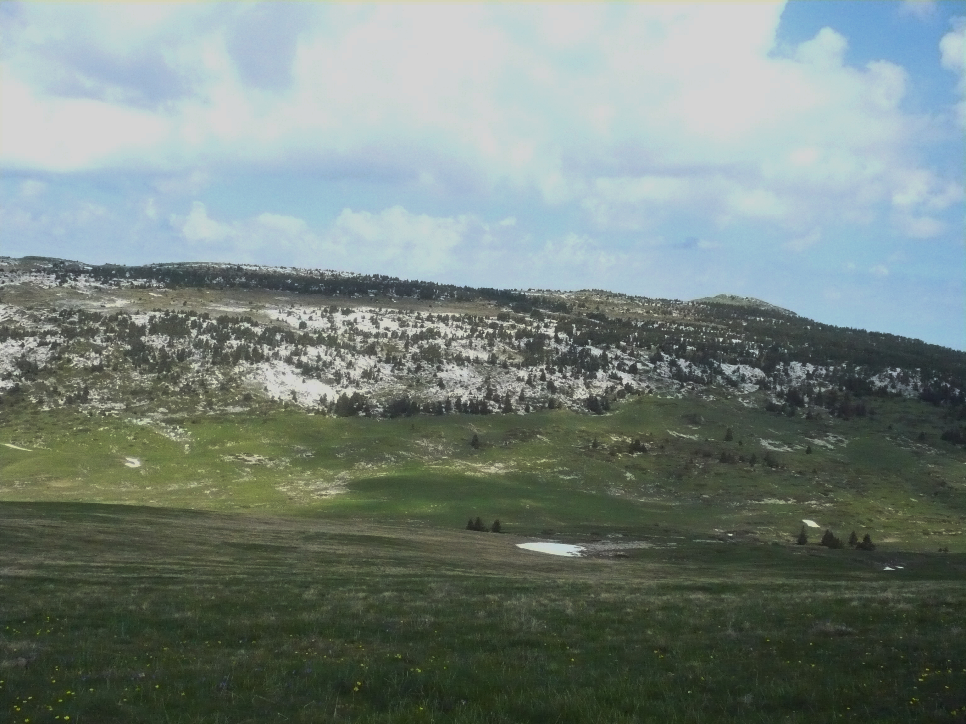 Les lapiaz du versant ouest ou se situe la plupart des cavités.